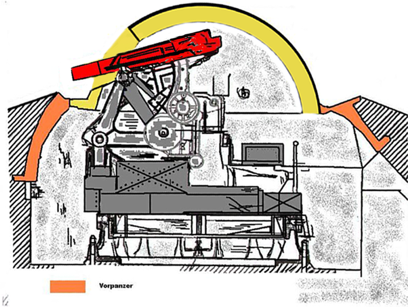 Geschützpanzerturm Modell 09